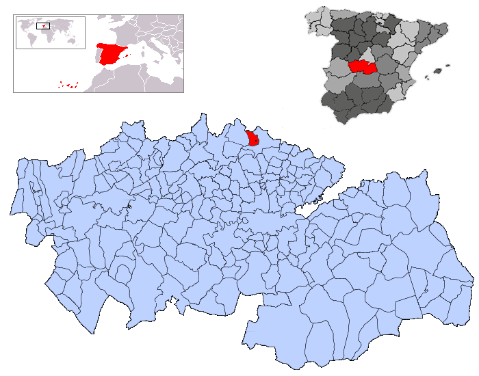 Valmojado en la provincia de Toledo